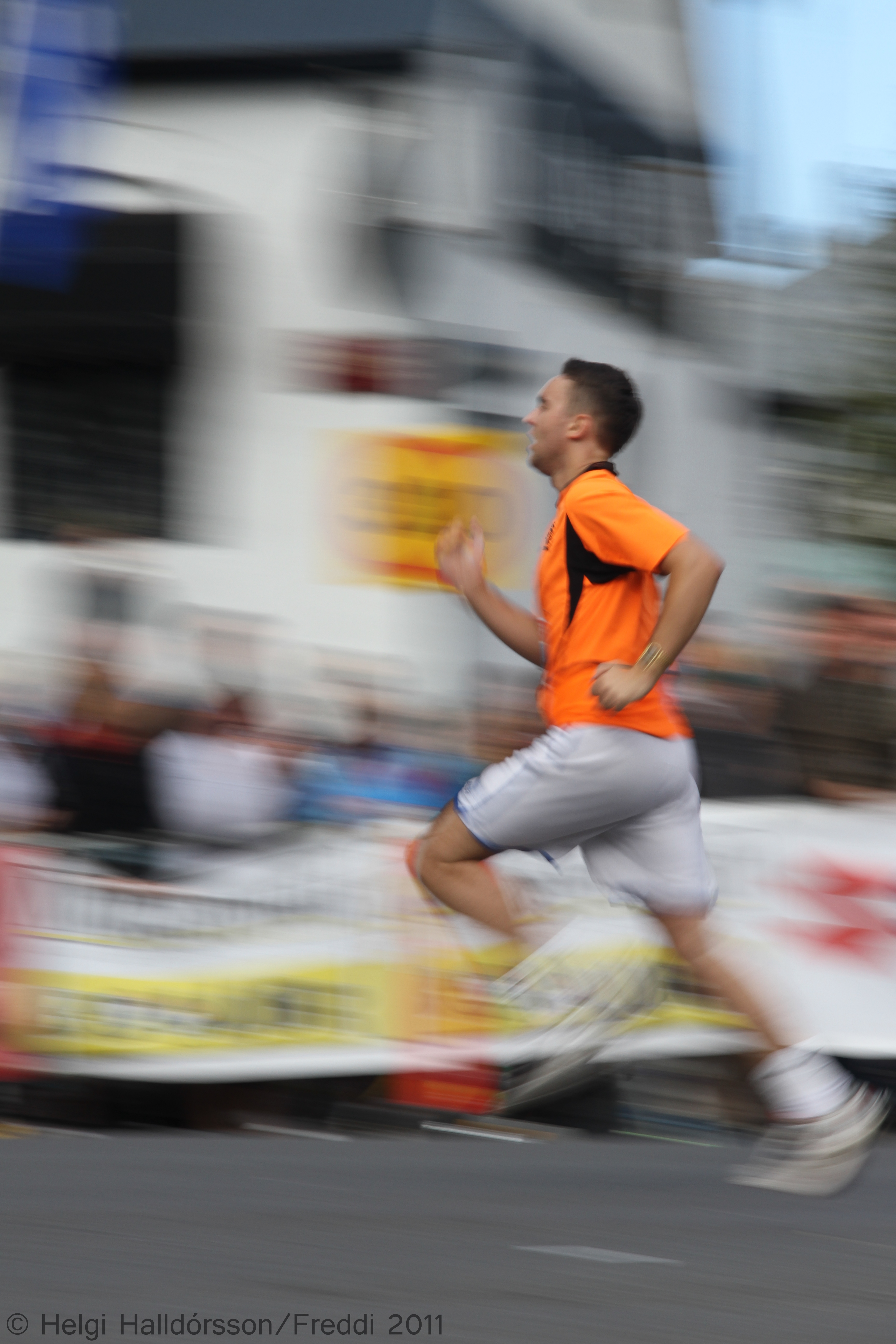 Run Forrest Run